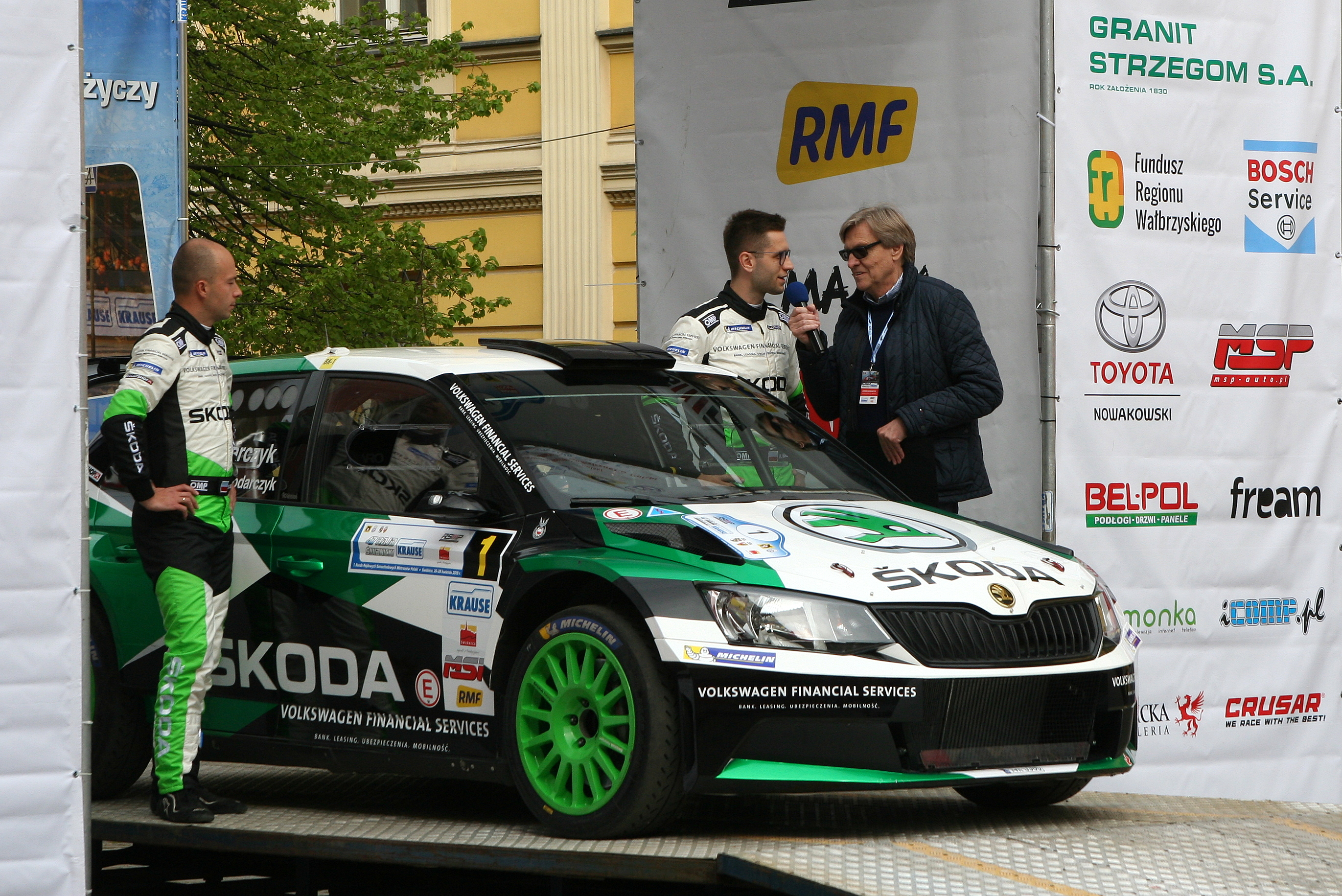 Rajd Świdnicki 2019 - Mikołaj Marczyk, ceremonia startu